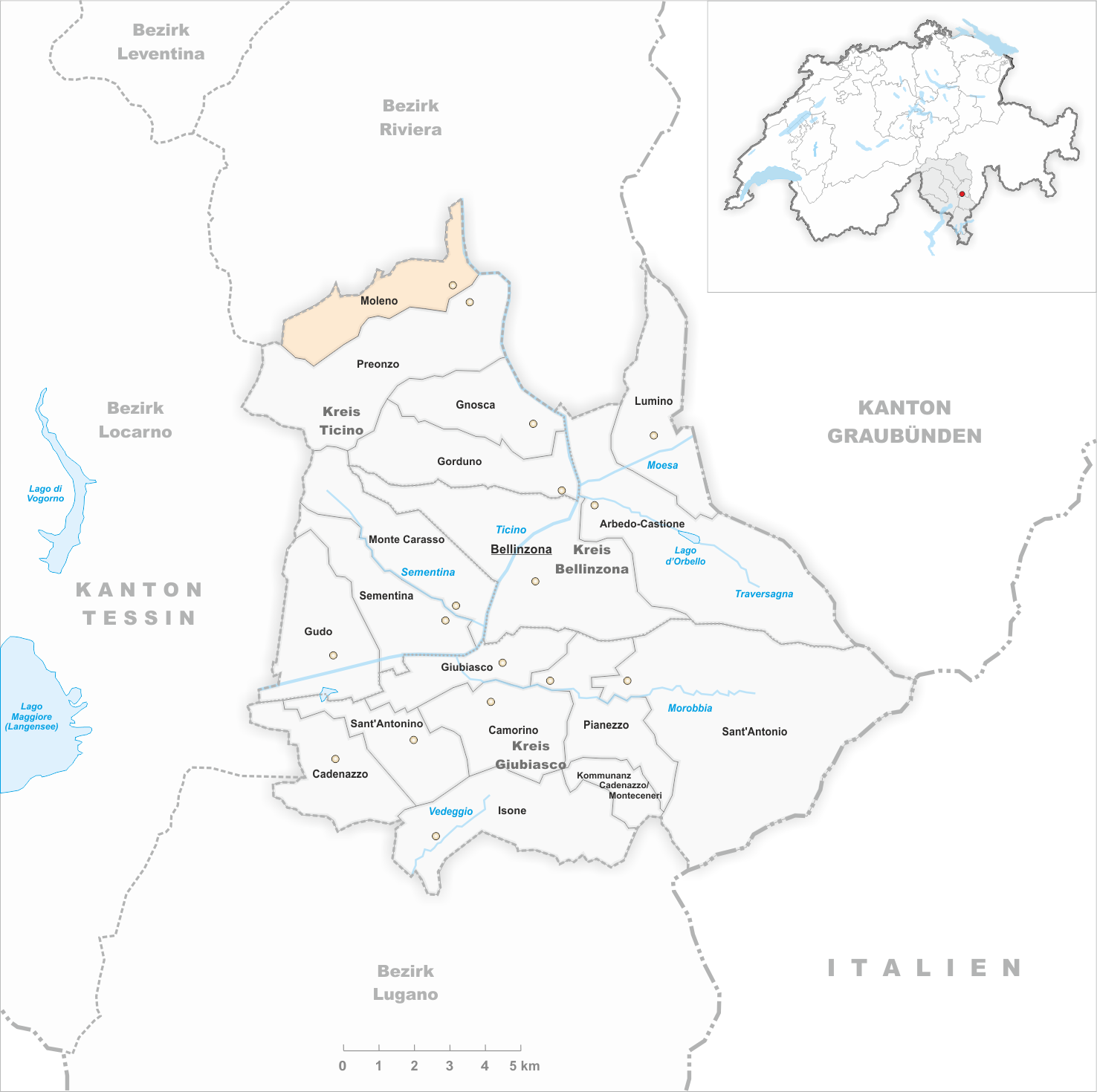 Municipality Moleno